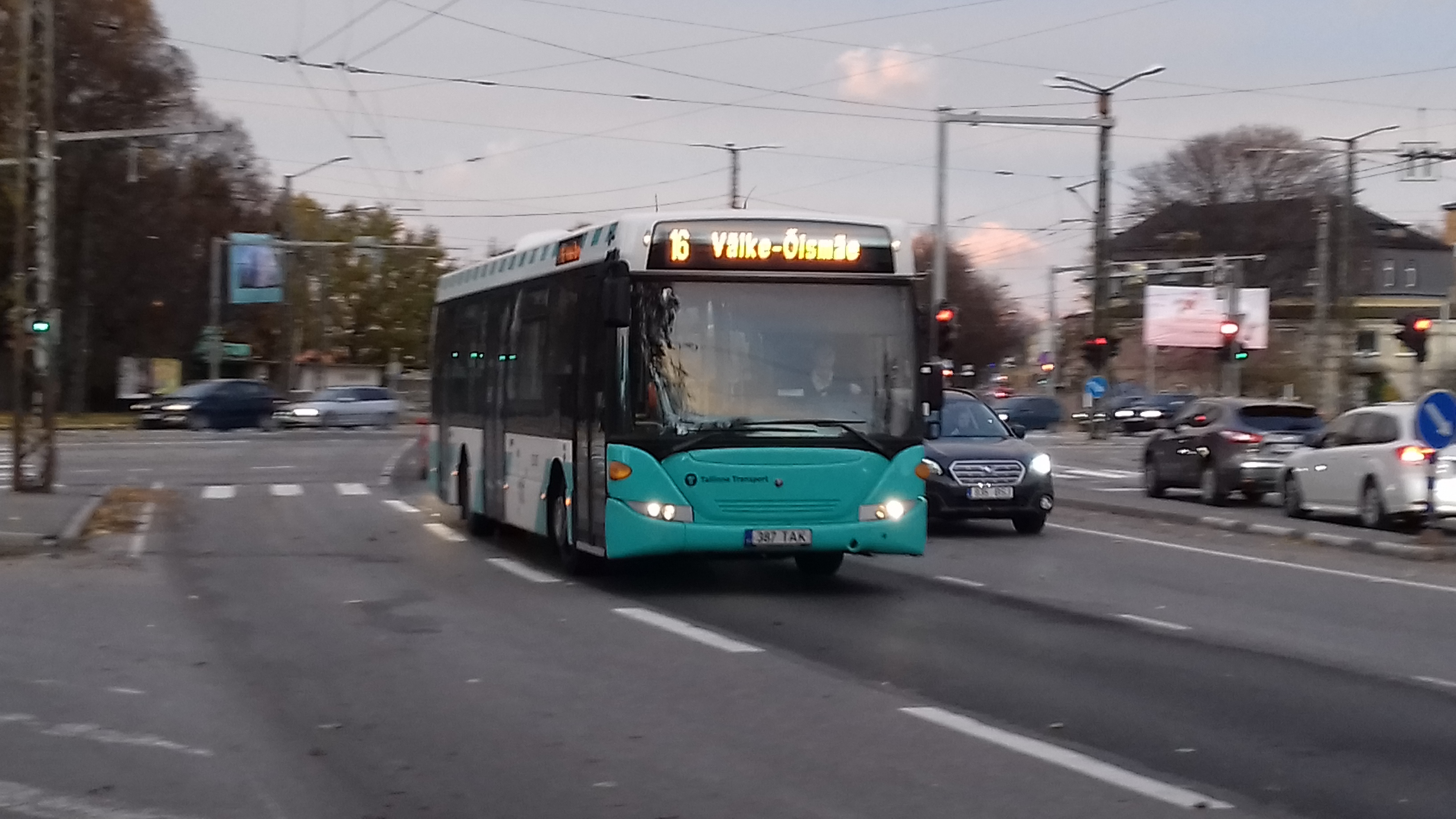 16 bussiliin Mustamäe teel